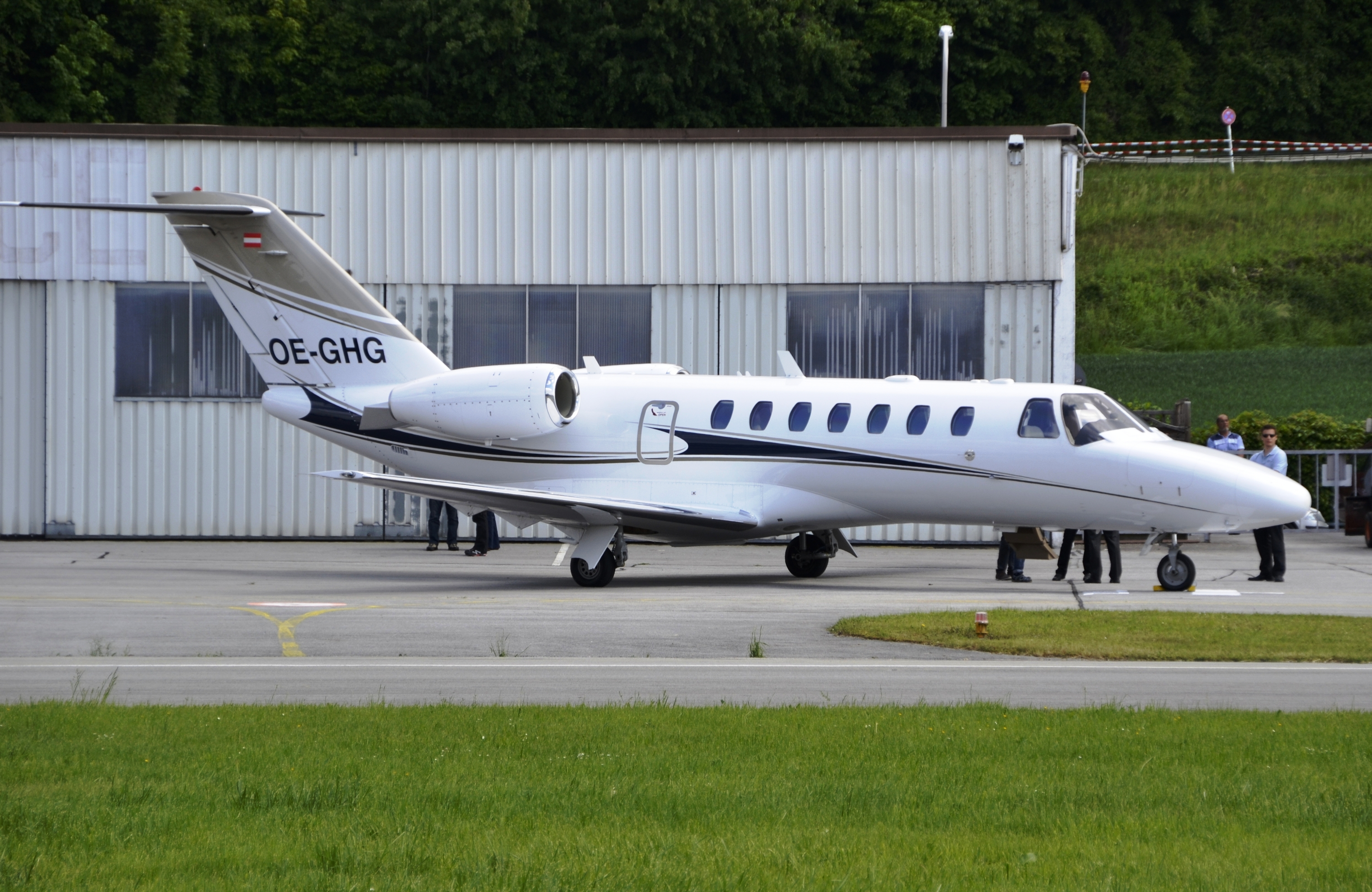 Flugzeug OE-GHG beim Flughallenfest Vilshofen 2012.